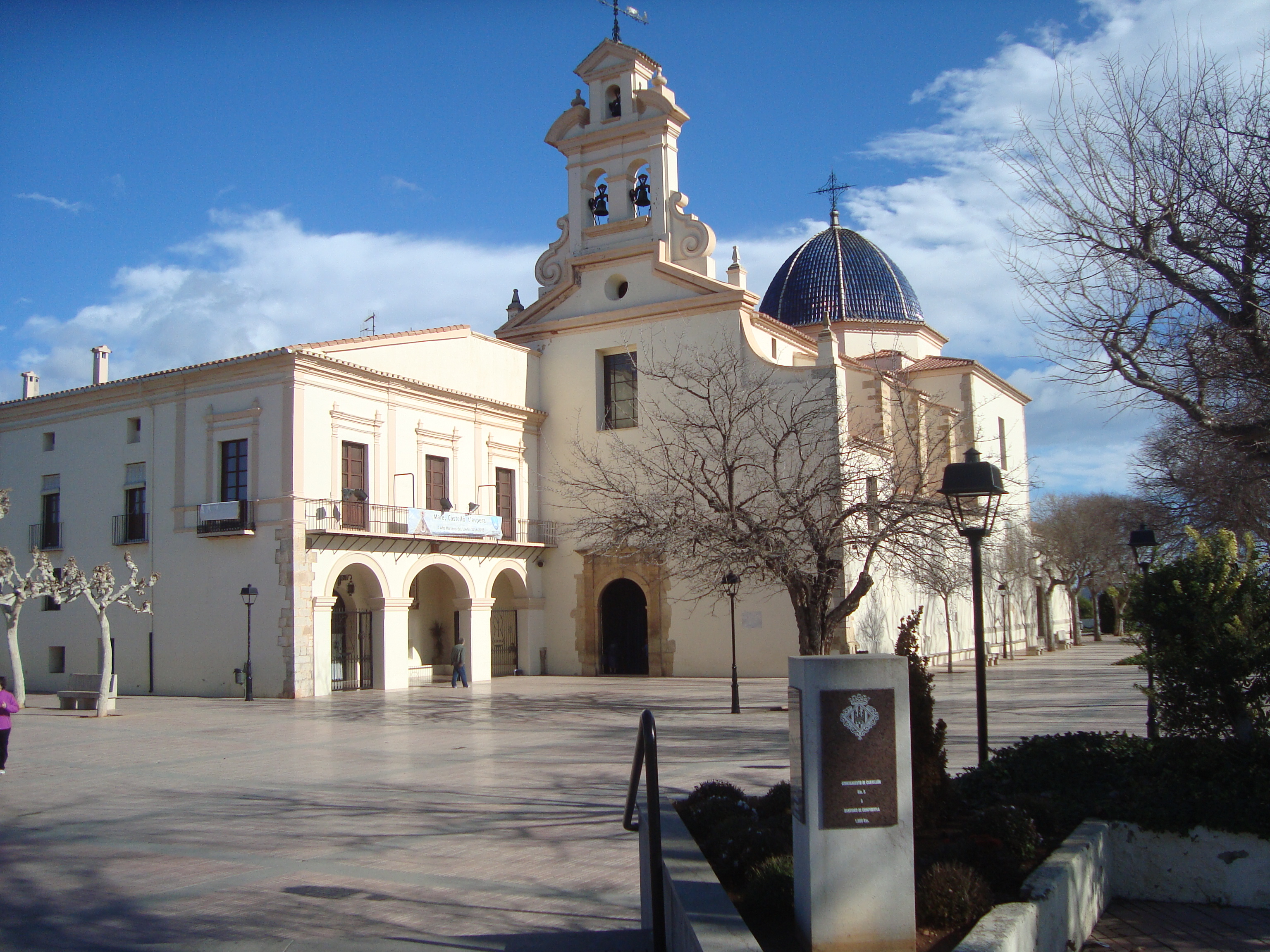 Basílica de la Virgen de Lidón, Castellón